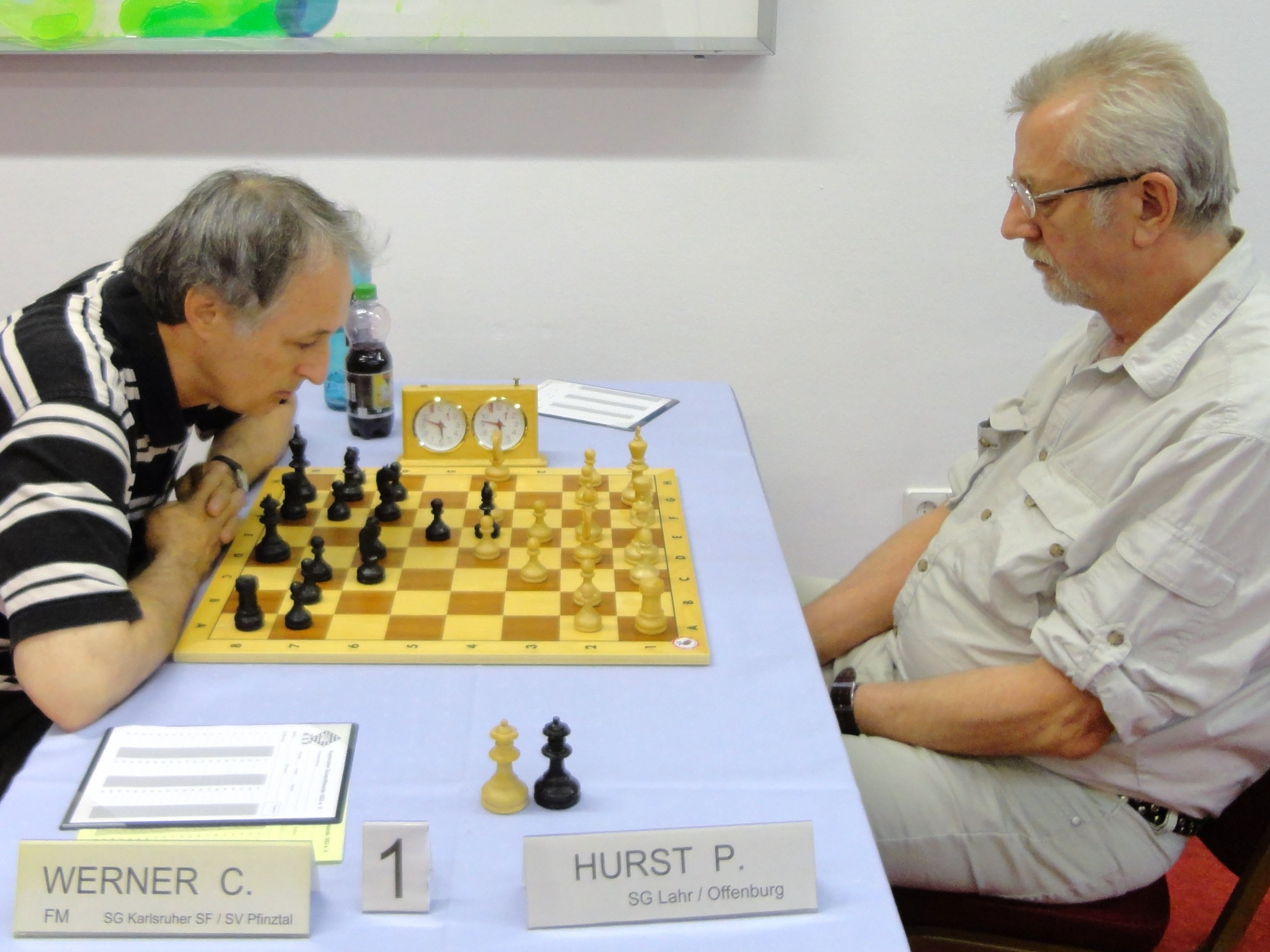 Clemens Werner und Peter Hurst beim Stechen um den Einzug ins Finale der Badischen Mannschaftsmeisterschaft der Senioren, Herrenalb 2013.